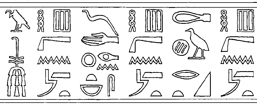 seal impression of queen Nymaathap (end of 2nd and beginning of third dynasty)